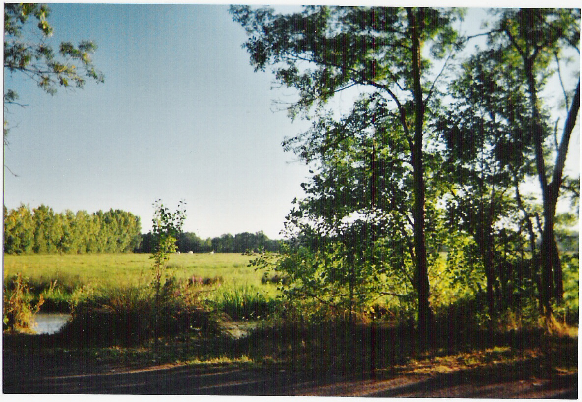 Vue du marais bénédictin à Saint-Benoist-sur-Mer.